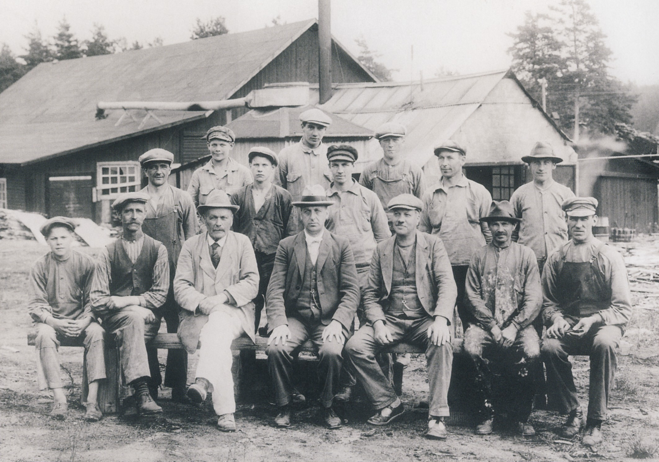 Gullringshus grundare Ansgarius Svensson (i mitten) med anställad på 1920-talet